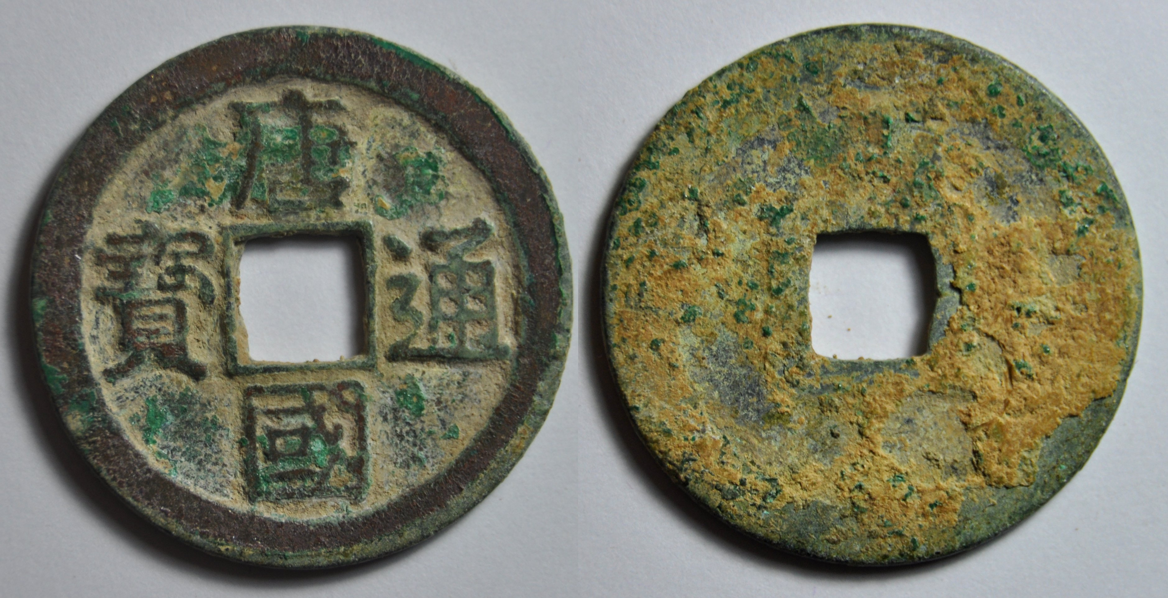 Une monnaie en bronze de l'empereur Yuan Zu (943-961) du royaume des Tang du Sud (937-975). A/ Tang Guo tong bao (Monnaie courante de l'empire des Tang) R/ vide Dimension : 25,02 mm Poids : 3,3 g. Style : écriture régulière ou kaishu Remarque : L'histoire de ce royaume est complexe. Il est fondé par Xu Zhigao (888-943) qui renverse le dernier roi de Wu appelé Yuang Pu en 937. Il se proclame empereur de Qi avec l'ère Sheng Yuan. Il avait été adopté par Xu Wen qui était ministre du roi de Wu. En 939, il revient à son nom antérieur, Li Bian et son royaume change de nom et devient le royaume de Tang. Son fils Li Jing devient empereur sous le nom de Yuan Zu en 943 et ouvre l'ère de Bao Da (943-957). Il attaque les royaumes de Chu, de Min auxquels il prend des terres. Il annexe le royaume de Chu vers 950. Il devient alors l'adversaire principal de la dynastie impériale des Zhou. L'empereur Shizong des Zhou attaque le royaume Tang qui capitule en 958. Li Jing devient vassal des Zhou et son royaume prend le nom de Jiangnan. La monnaie a été émise à partir au début du règne c'est à dire vers 943-945. F. Thierry signale que ces monnaies ont été émises pour payer les troupes et que les faussaires les ont vite imitées en produisant des plus petites et légères. Il existe aussi des monnaies plus petites officielles qui valaient la moitié d'une kaiyuan. Elles ont été émises en 959. Il y aussi des grandes monnaies fondues en 958-959. Indice de rareté : 11 (Commune) La monnaie est en excellent état. Chine monnaie Tang du Sud Monnaies de la dynastie des Tang du Sud (937-975)